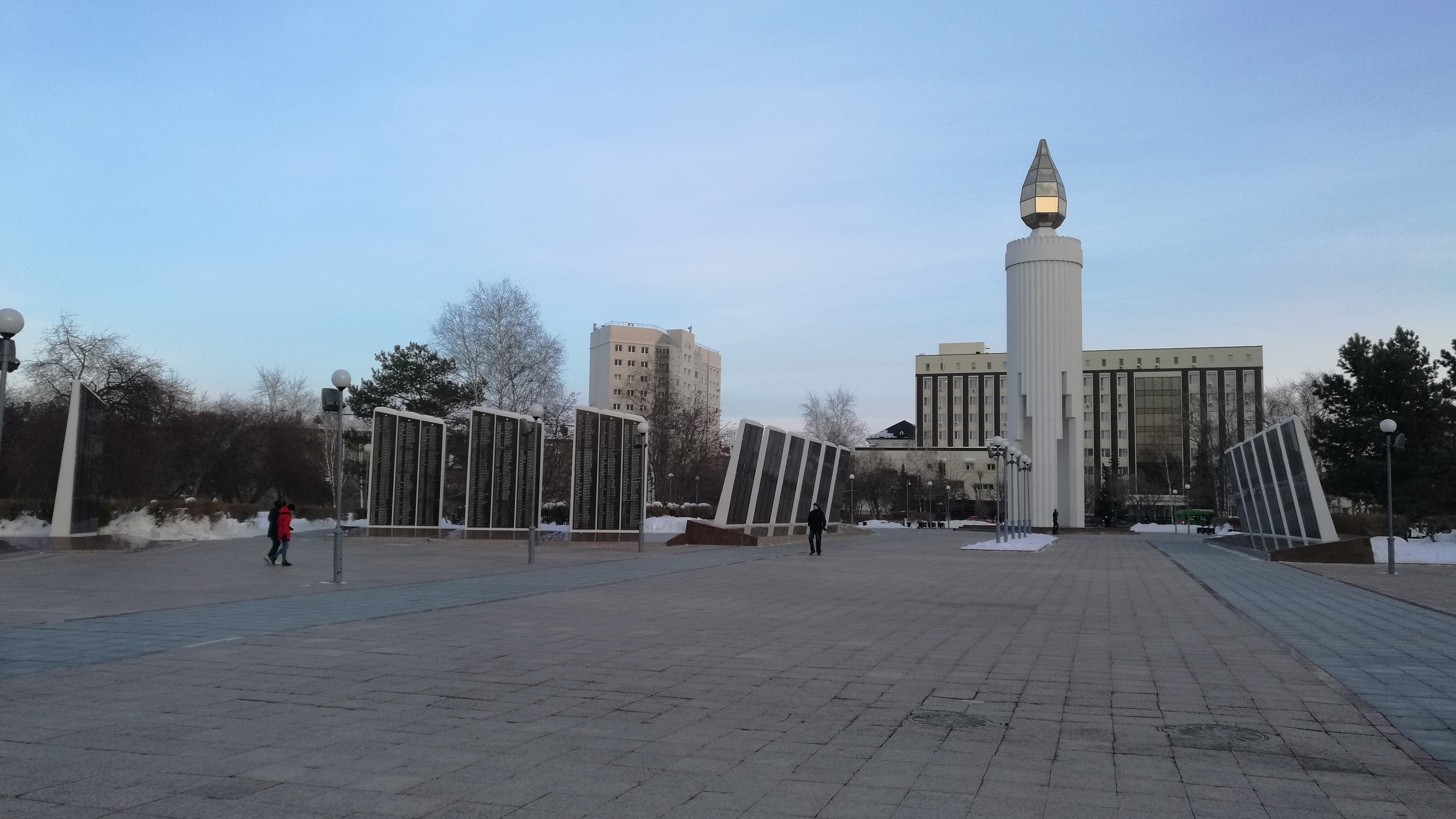 Memorialo de la Dua mondmilito en Placo de Memoro. Tjumeno, Rusio.